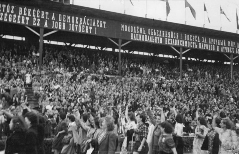 Budapest, II. Weltfestspiele, Festumzug Weltjugendkongreß Budapest-August 49